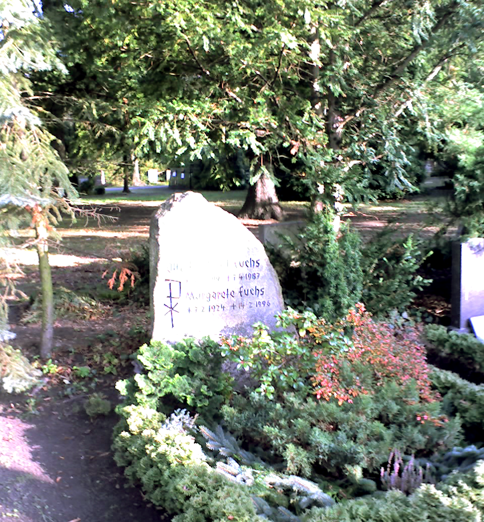 Das Grabmalmal Fuchs au fem Friedhof Pankow III